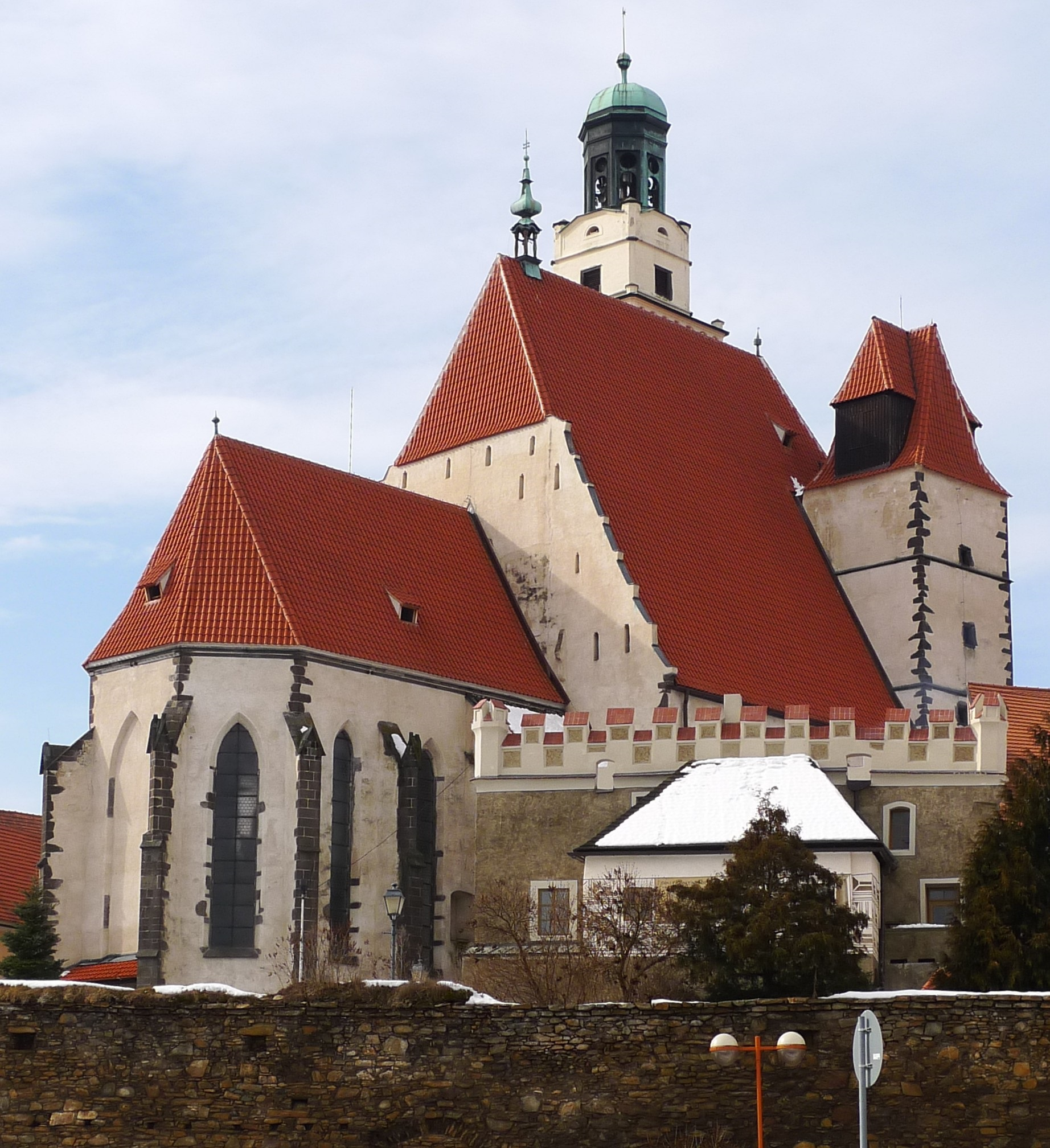 Kostel sv. Jakuba Většího (Prachatice), nám. Kostelní, Prachatice